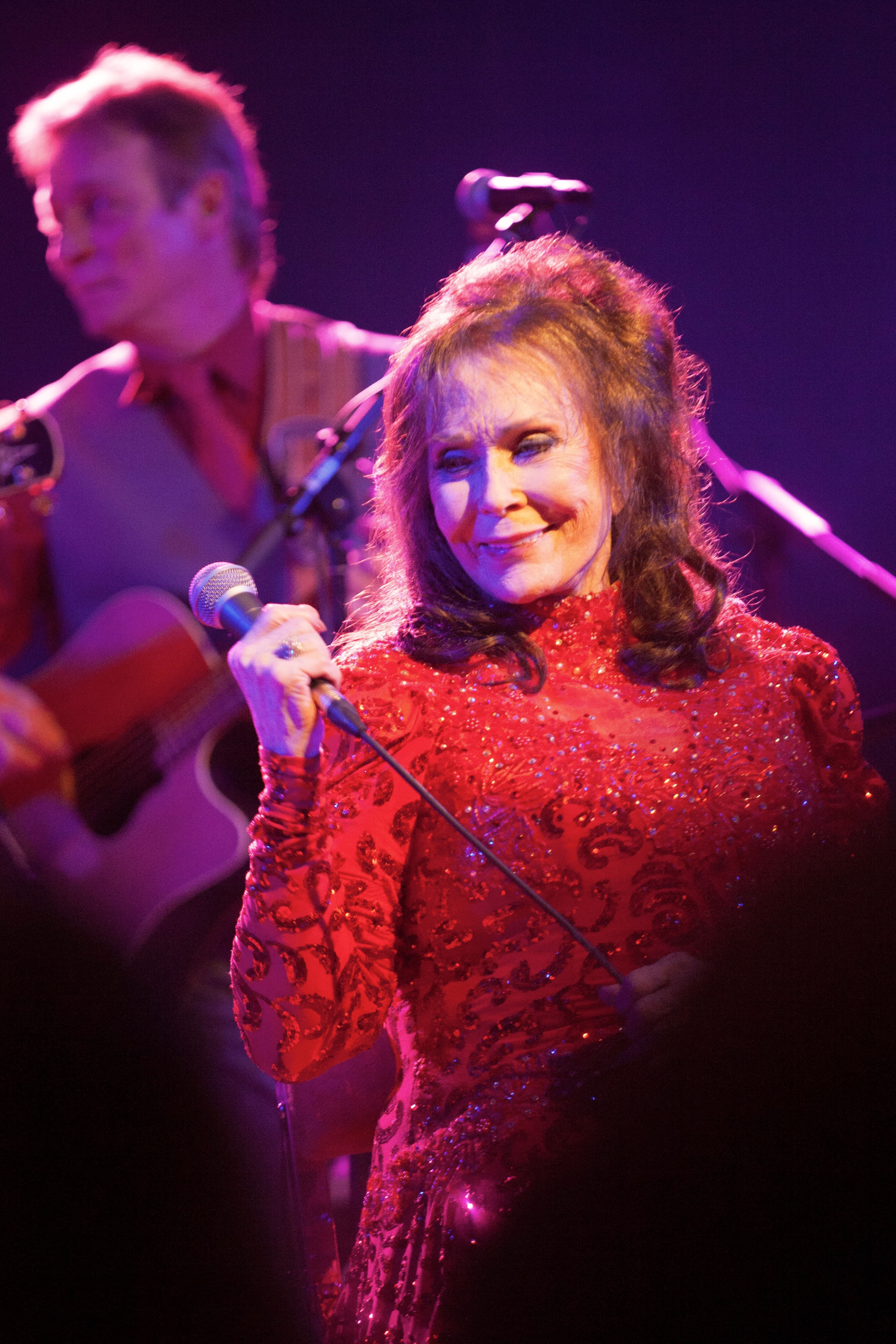 Loretta Lynn SXSW 2016 -8842.jpg